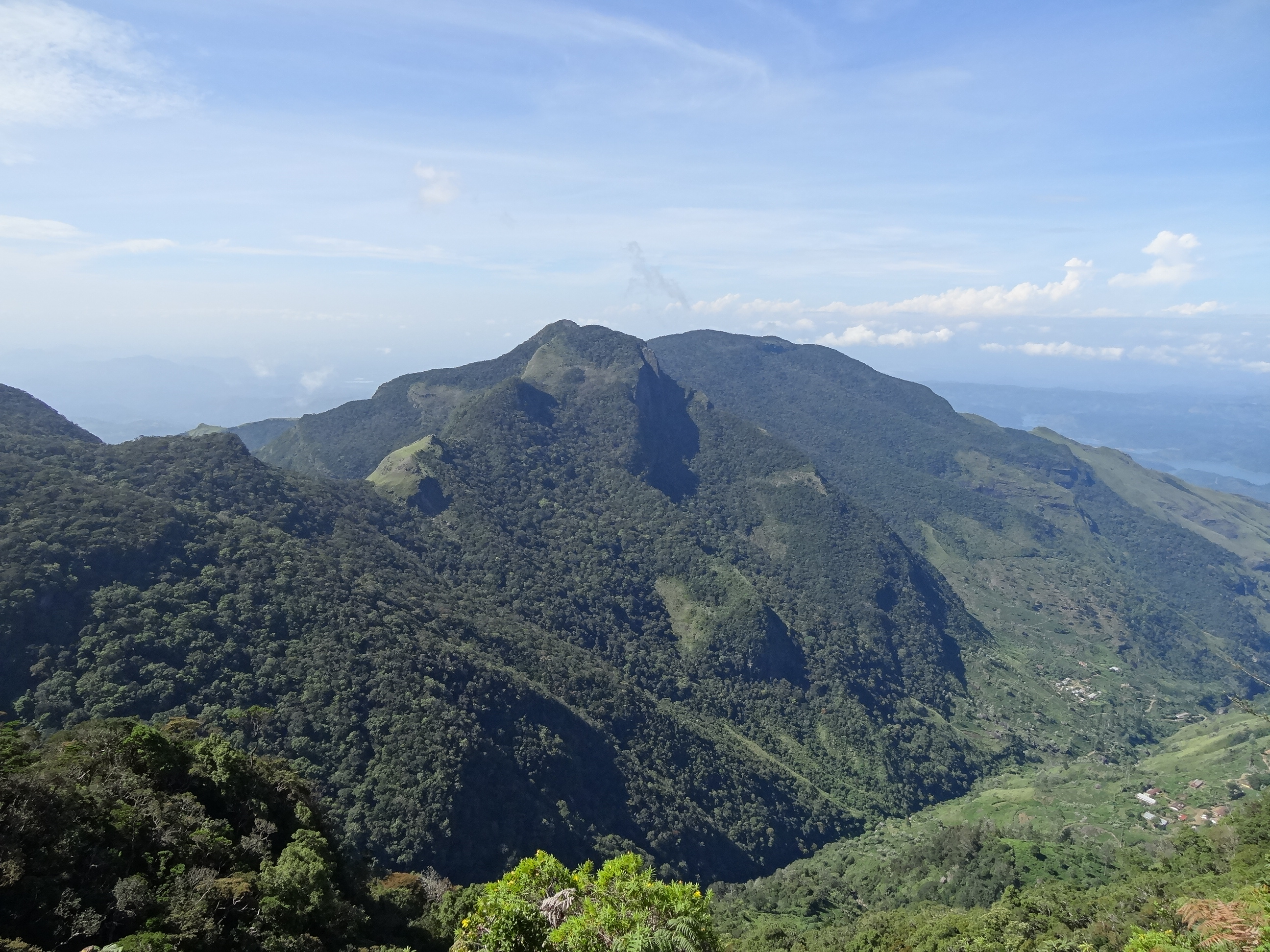 Horton Plains National Park